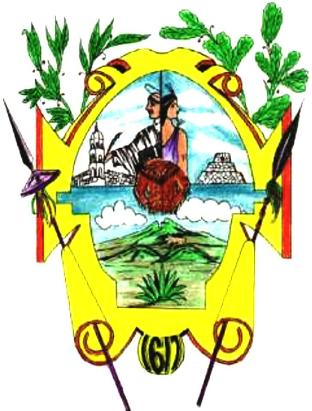 Escudo del Municipio de Tula, Tamaulipas, México